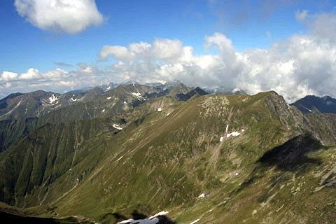 Fagaraš. Pohled z nejvyššího vrcholu Moldoveanu.